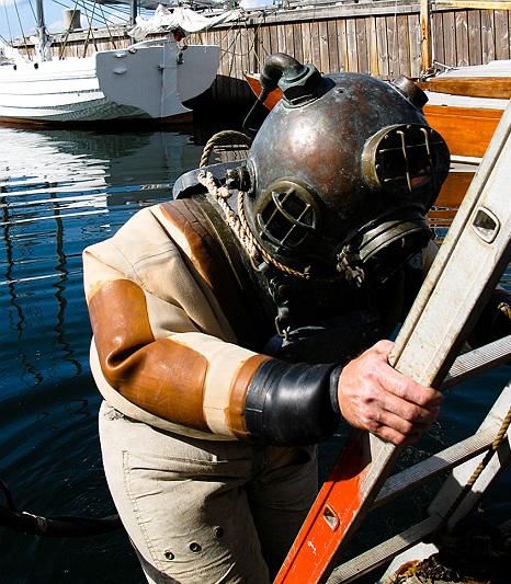 Tungdykker med Hansen tobolt hjelm